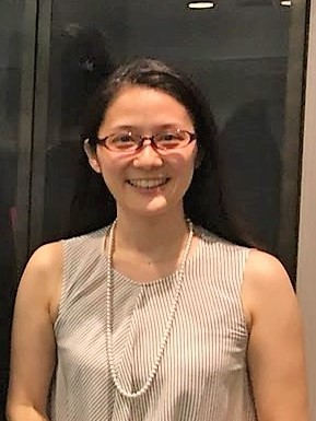 2018年夏の増原裕子